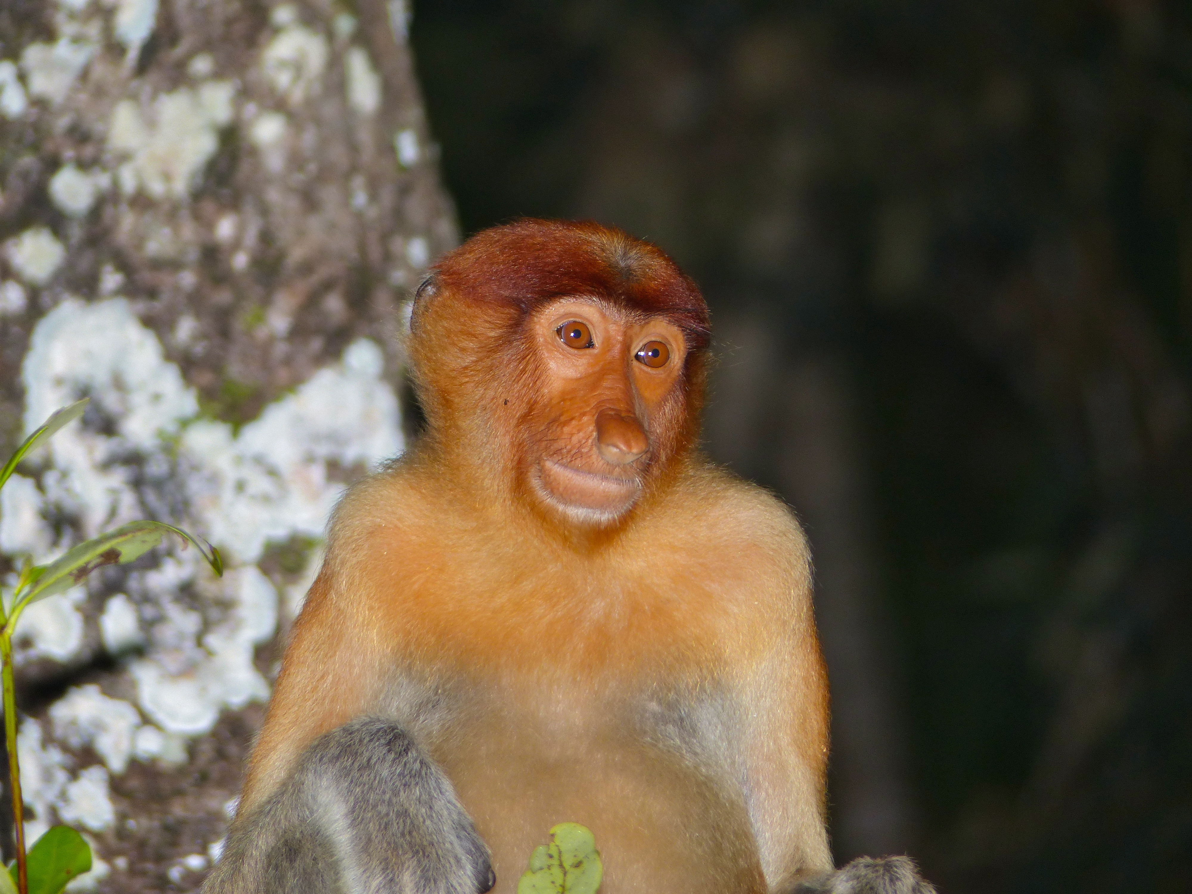 Bako NP, Sarawak, MALAYSIA